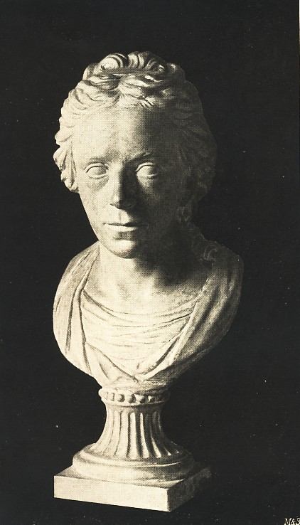 Luise von Göchhausen - Büste